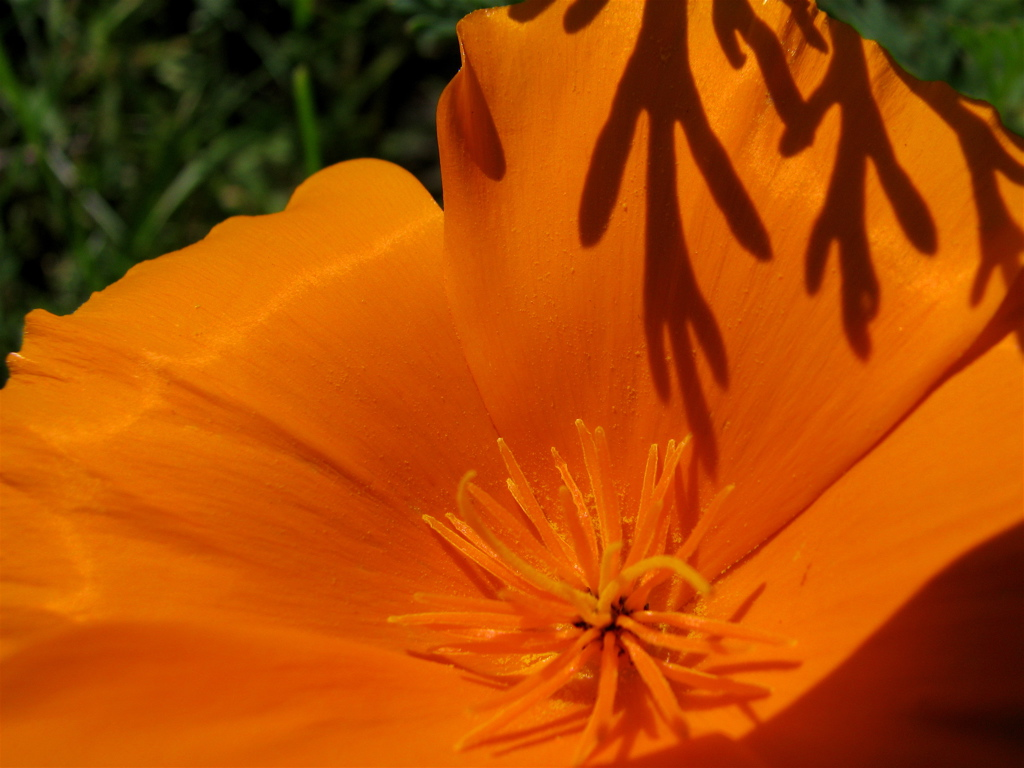 Shadows